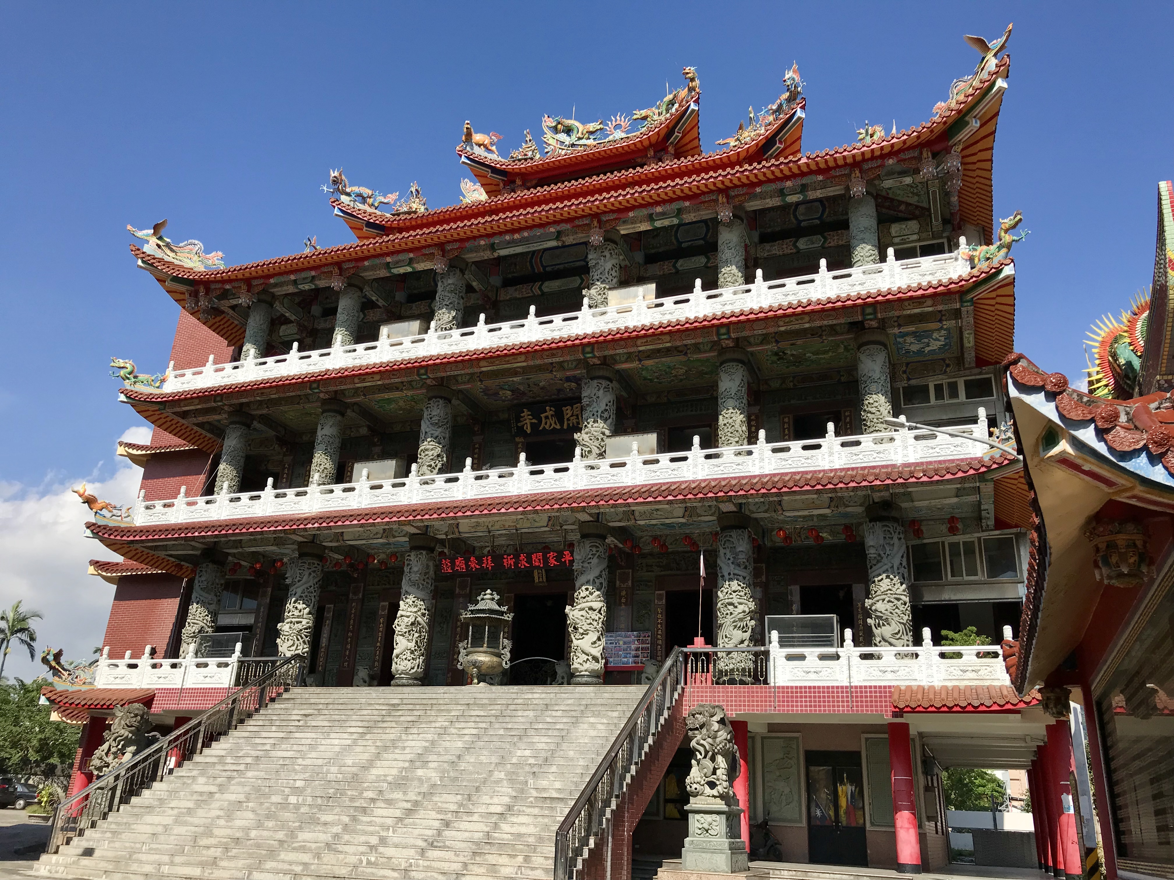 頭城開成寺城隍廟斜照